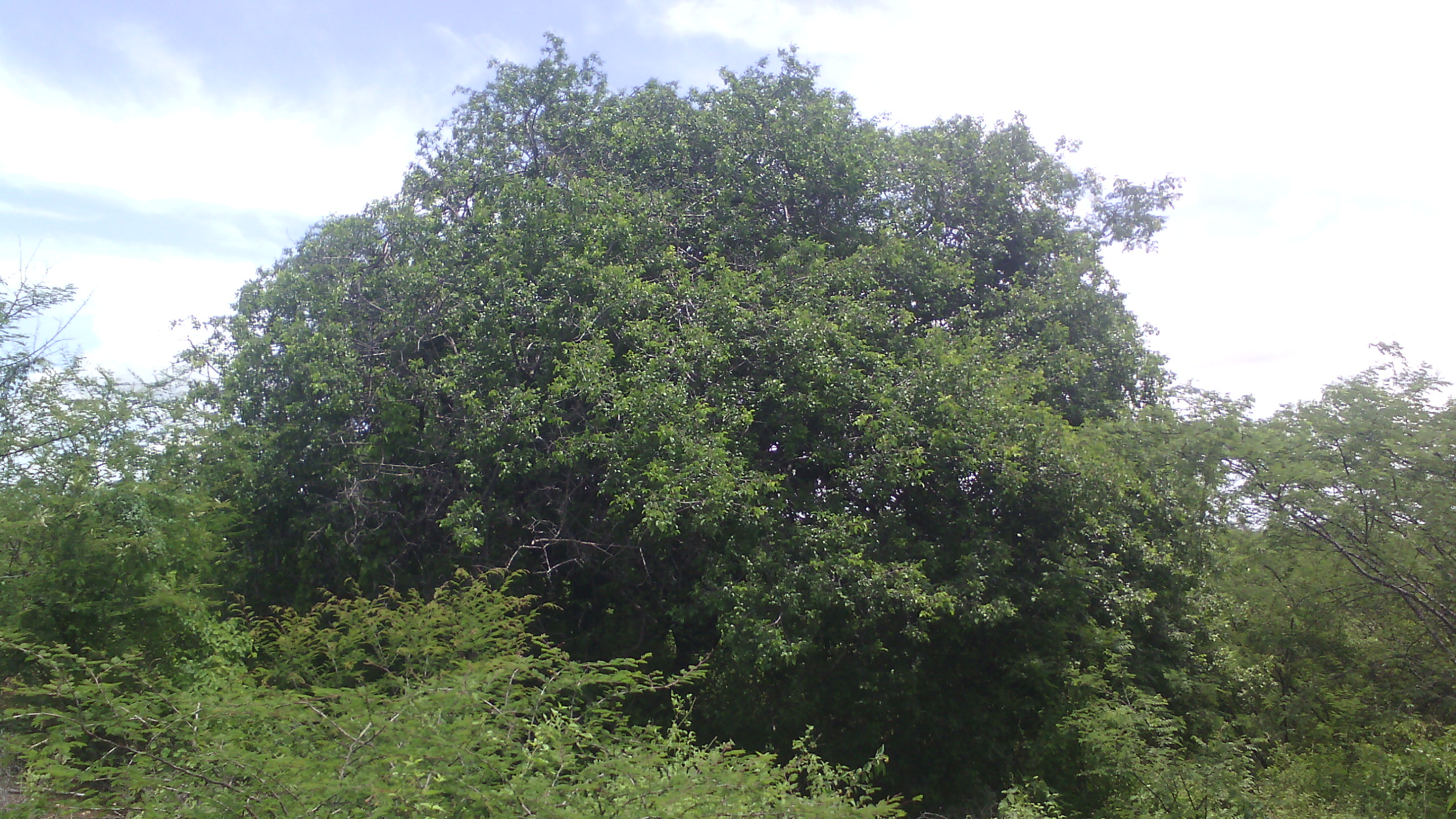 umbuzeiro com frutos